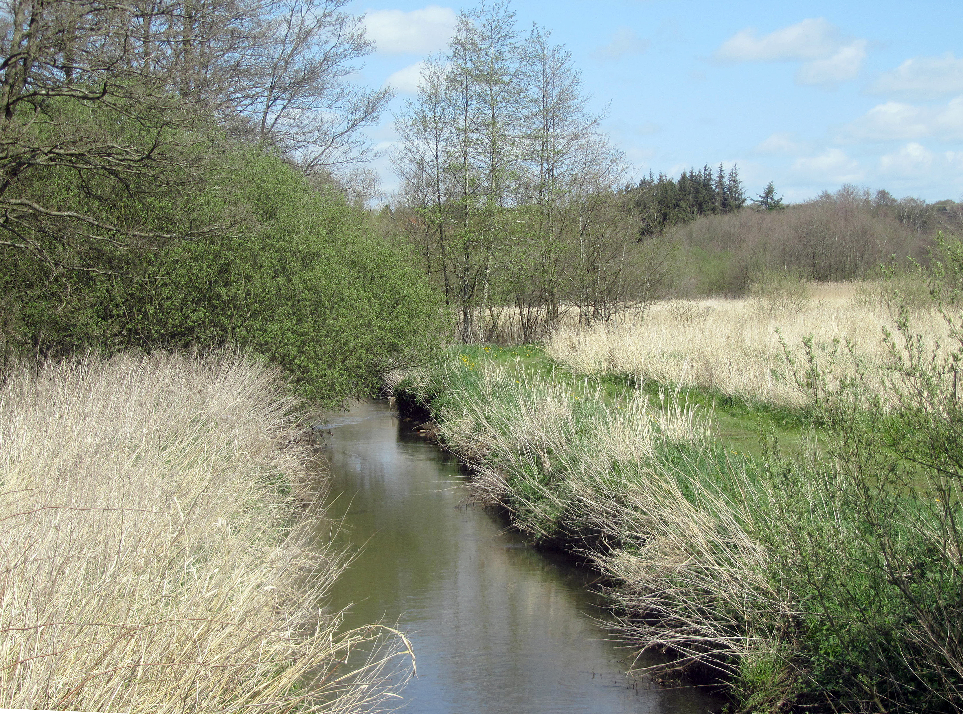 Lilleå ved Hinnerup